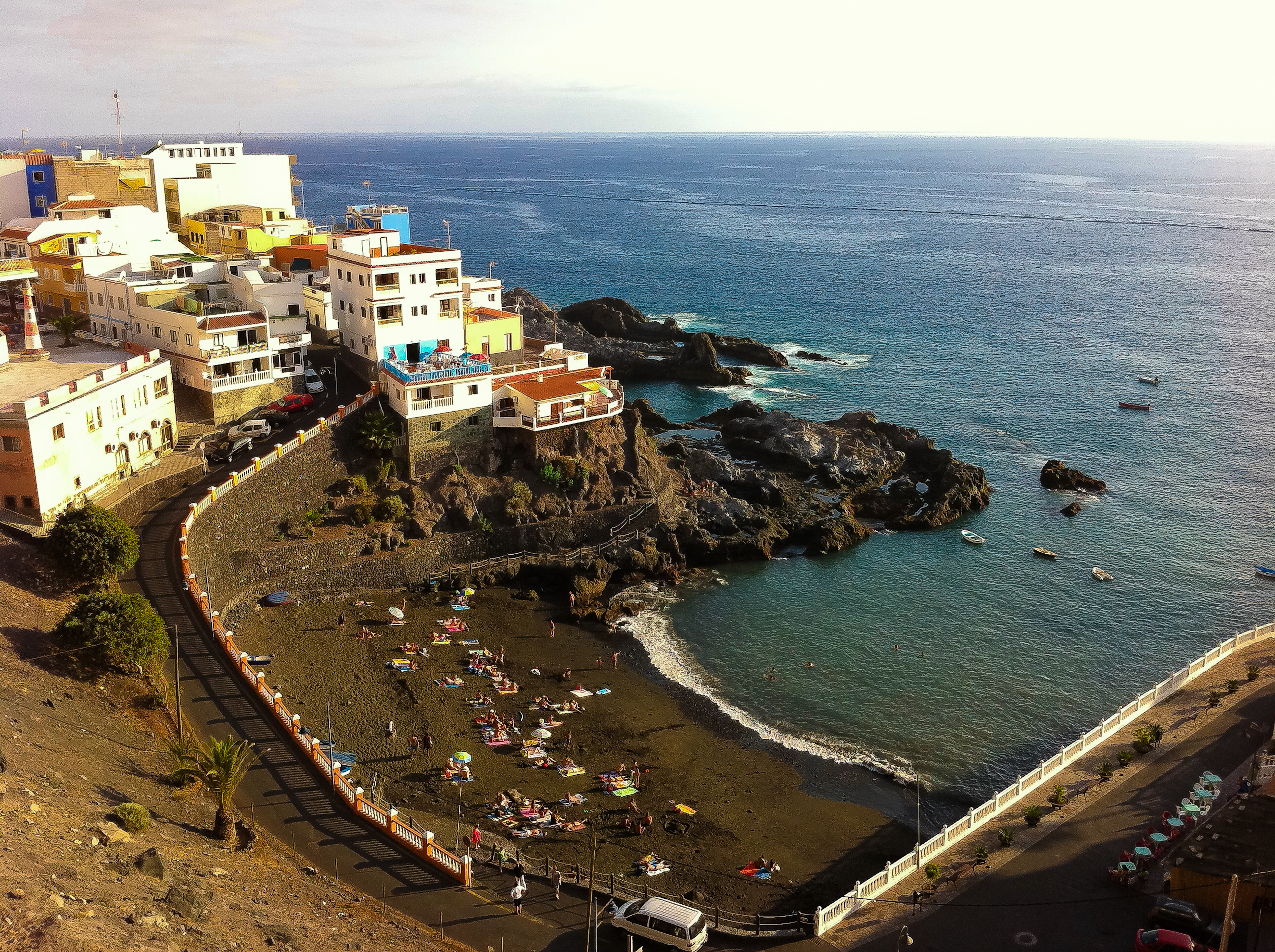 Vista de Puerto de Santiago, Islas Canarias